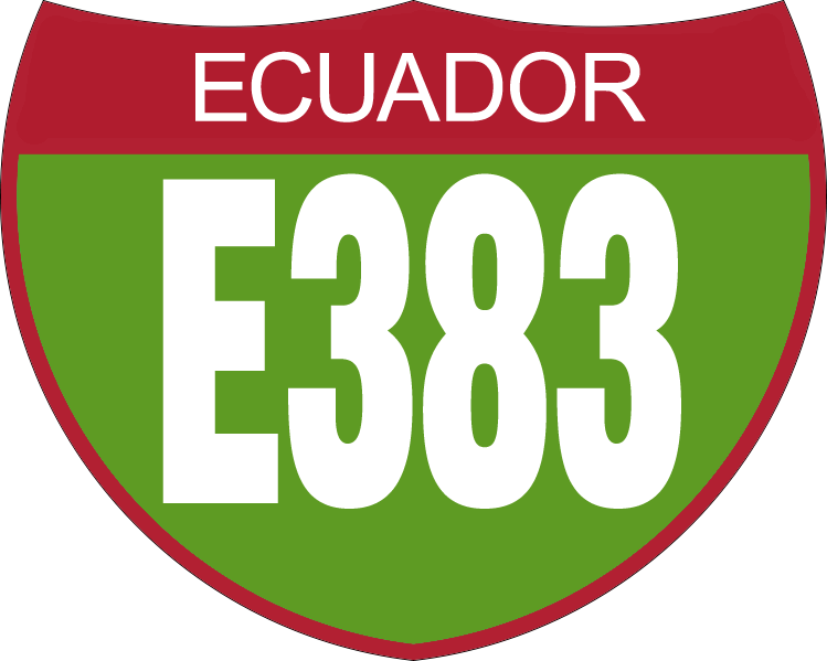 Disco de Identificación Ruta Colectora E383